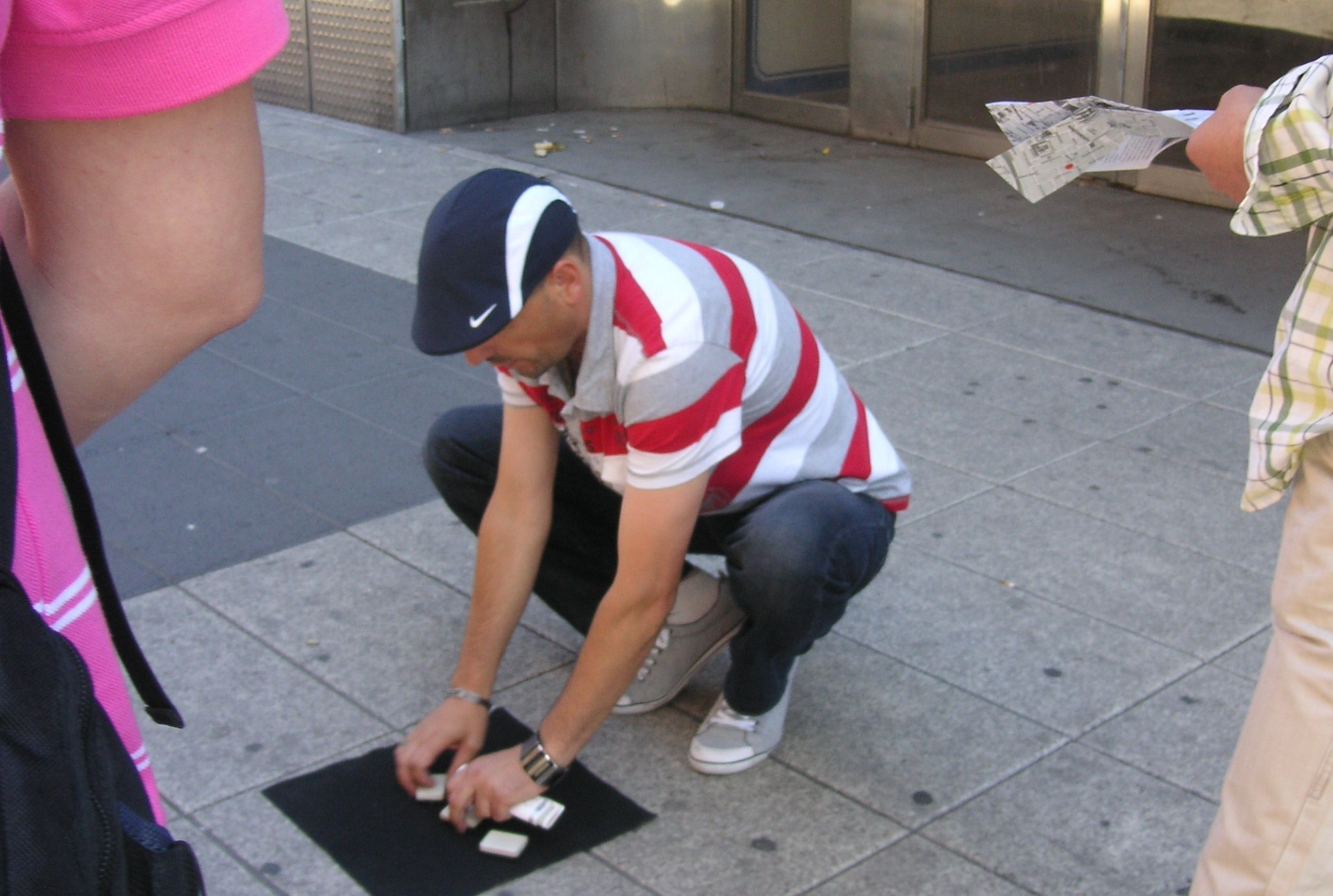 Ungesetzlicher Hütchenspieler in Stockholm